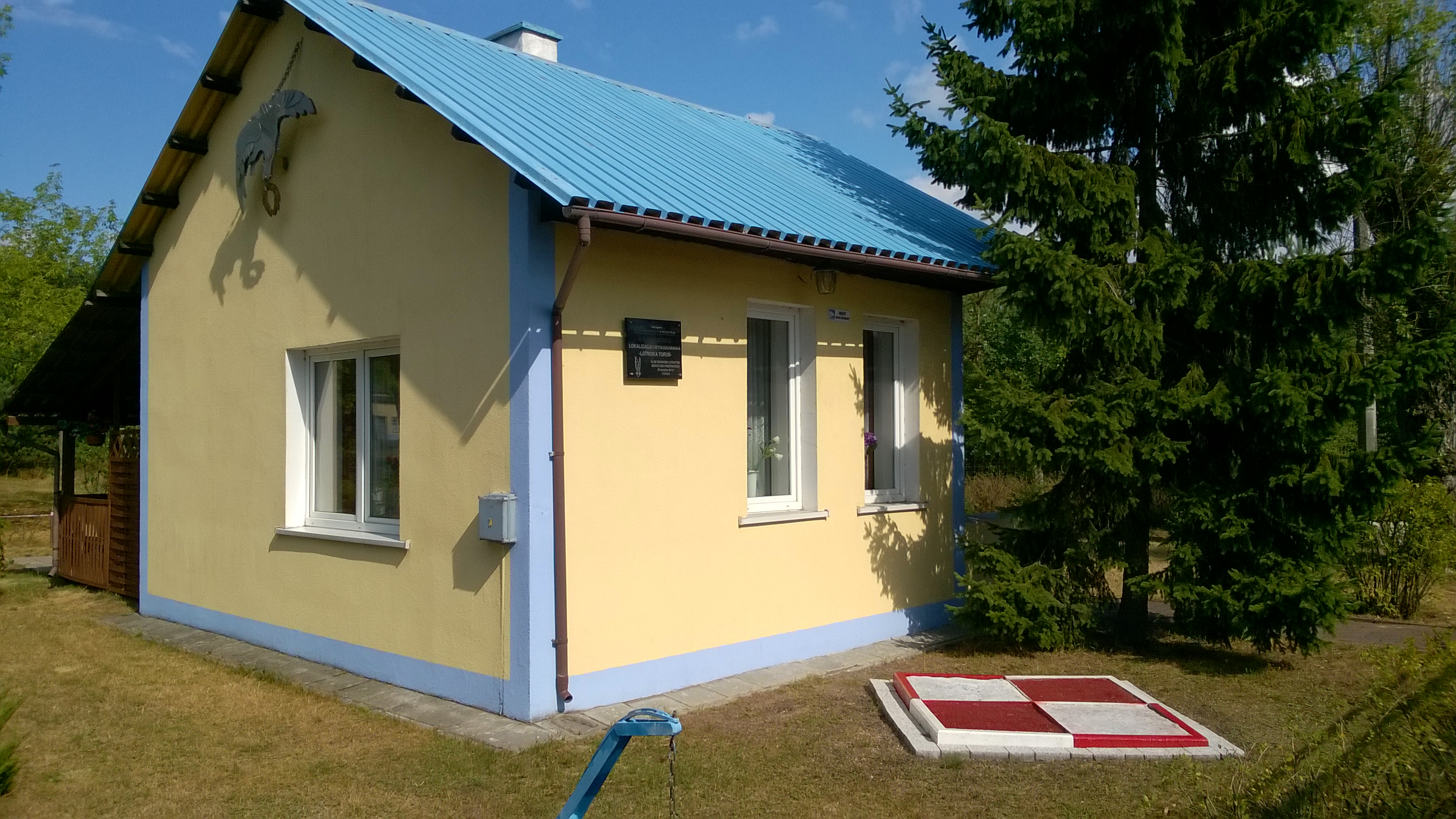 Klubu Seniorów Lotnictwa na toruńskim lotnisku